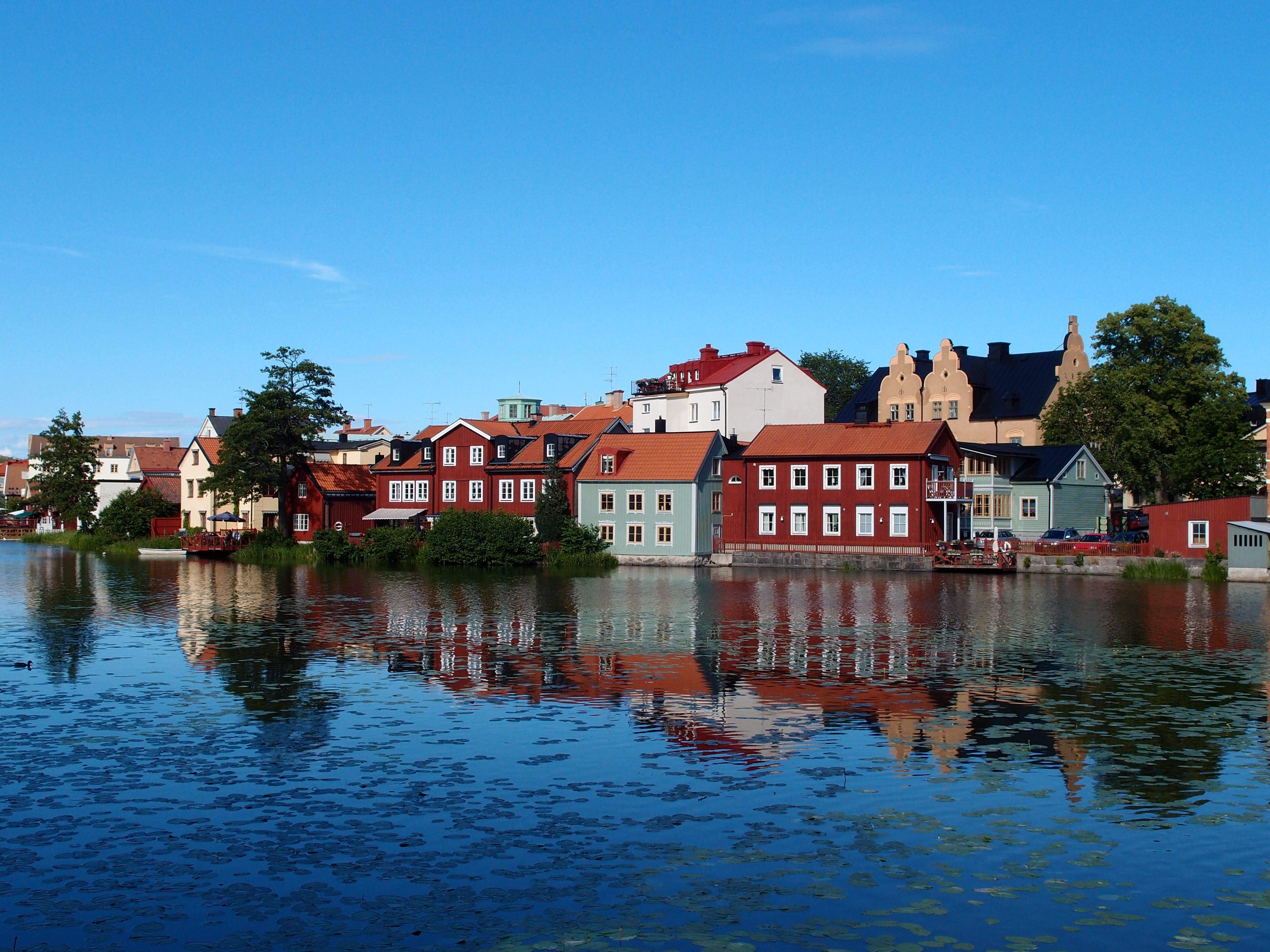 Eskilstuna, Zweden (Sverige)